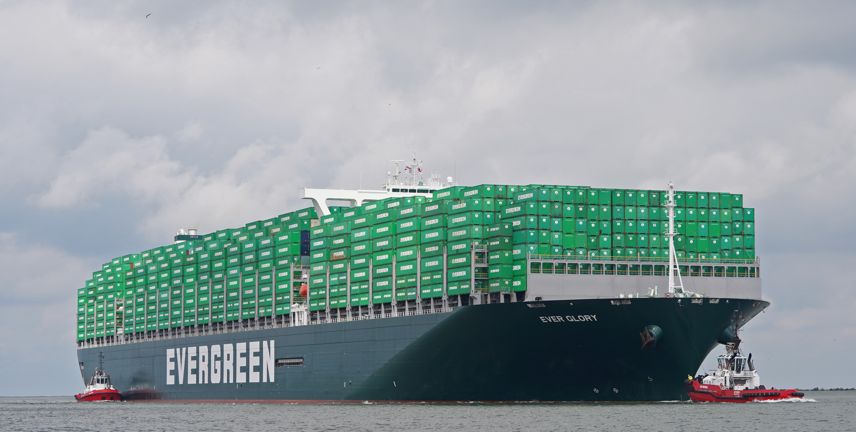 Aankomst van de Ever Glory van Evergreen in de Maasmond , omdat het gaat om een maidentrip en het eerste 20.000 TEU containerschip van de rederij dat bovendien is uitgerust met scrubbers, is het vaartuig (bijna) helemaal gestuwd met groene Evergreen containers , gezien vanaf het partyschip GEMINI die was gecharterd door het havenbedrijf van Rotterdam voor pers en (hobby) fotografen